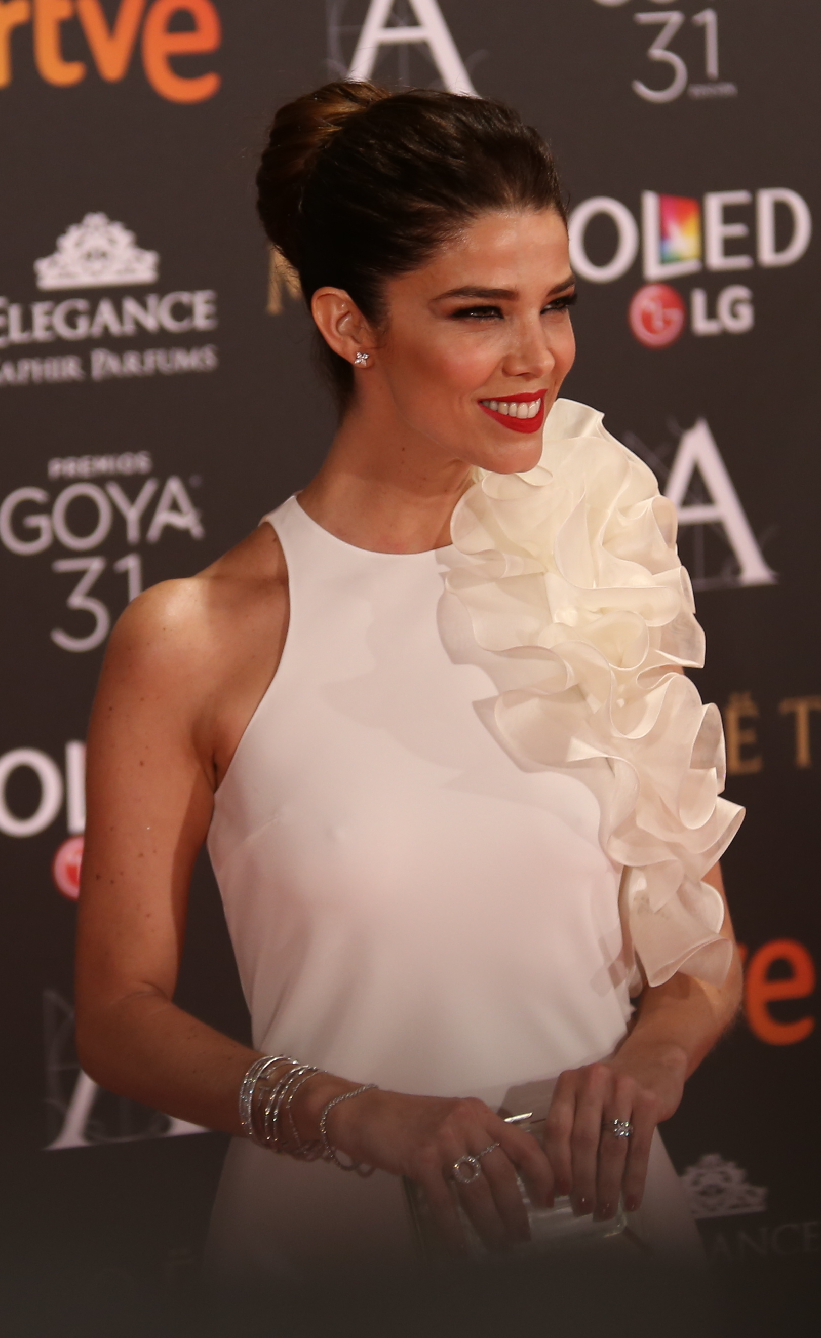 Juana Acosta en los Premios Goya 2017